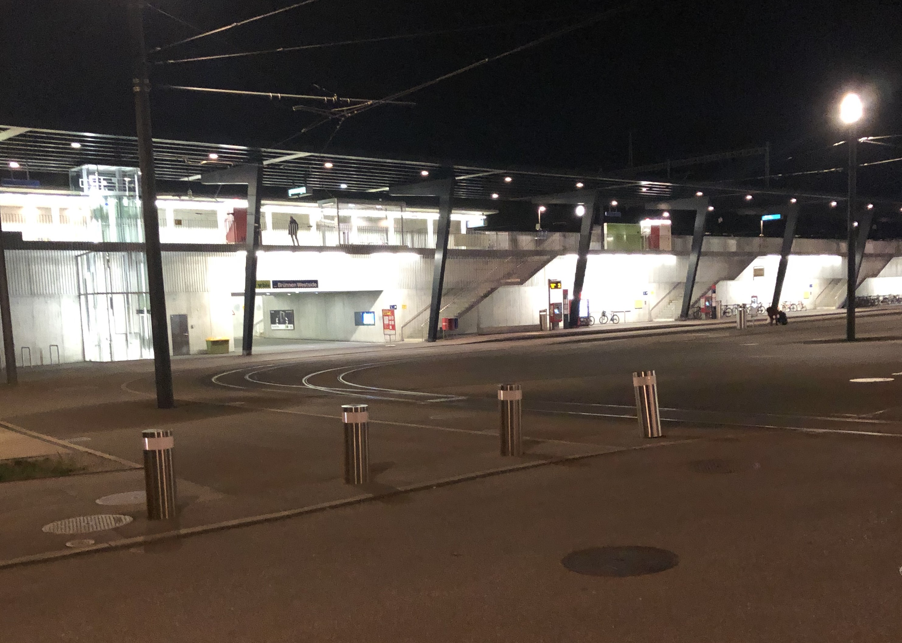 Bahnhof Brünnen bei Nacht